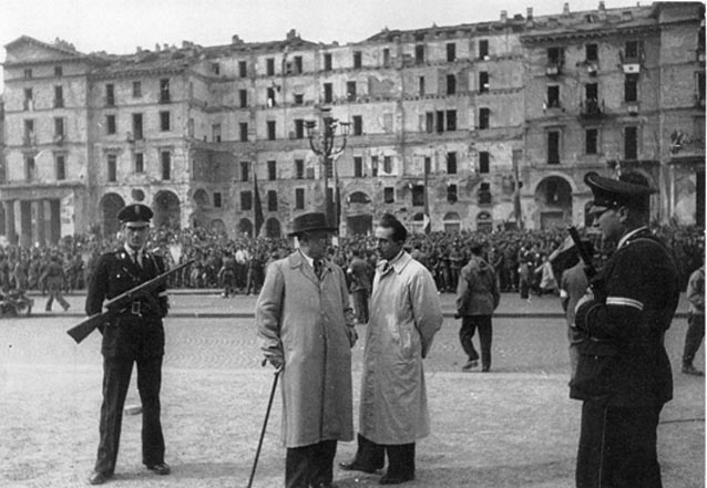 Foto di Giorgio Agosti, questore di Torino, 6 maggio 1945